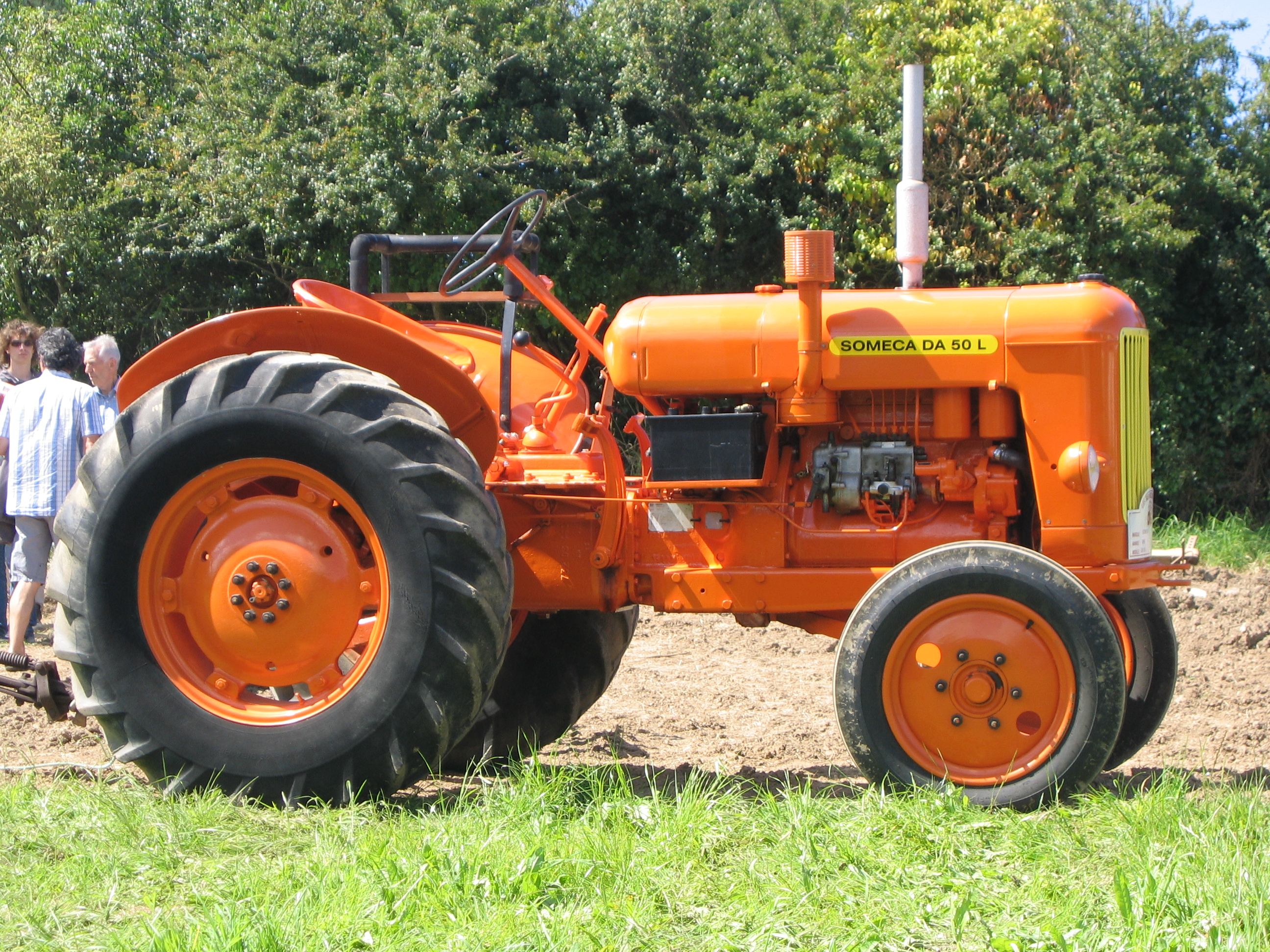 Tracteur Someca, Plougoulm gouel an eost 2007